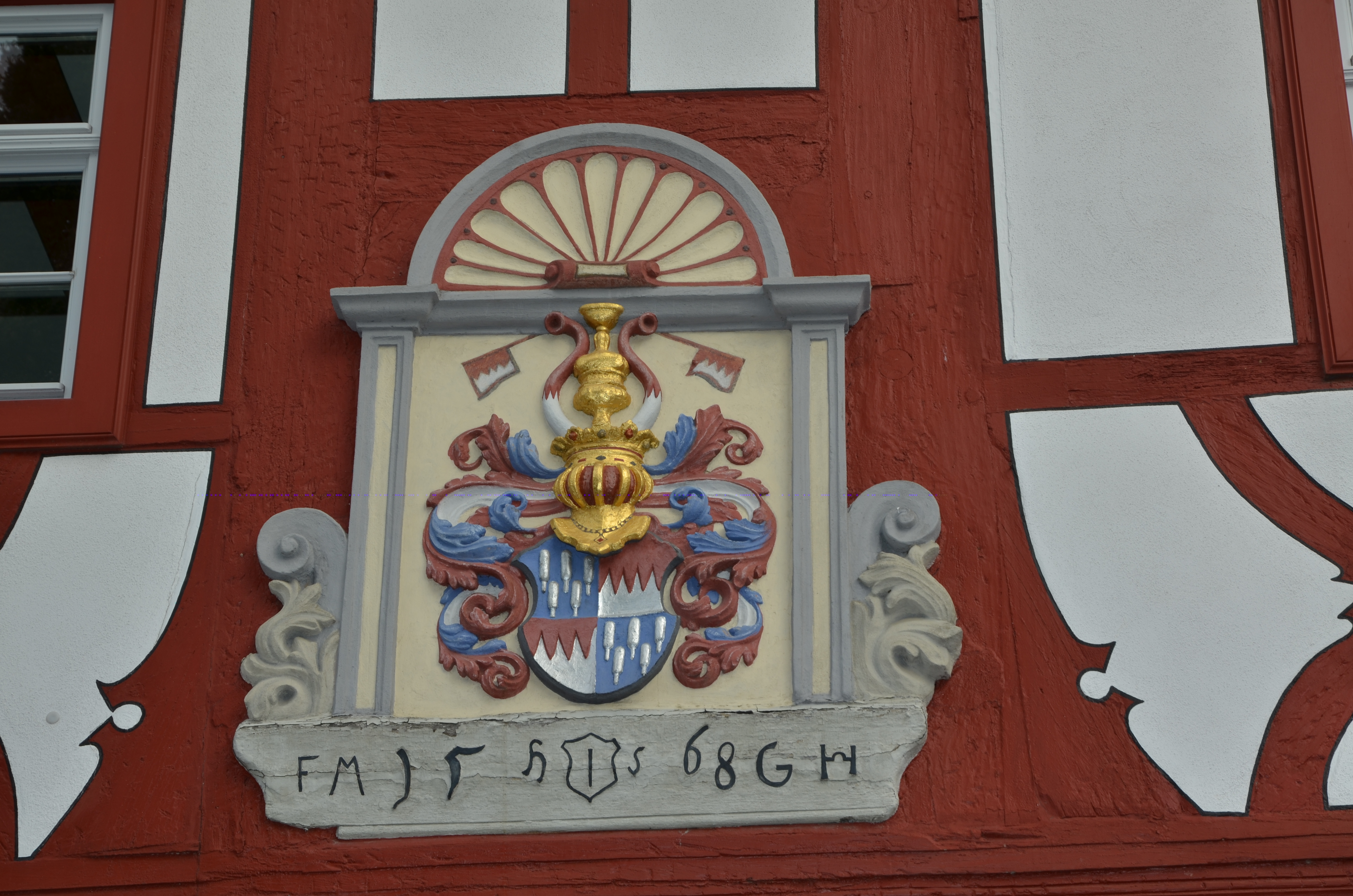 Markt Einersheim, Rathaus, Wappen der Schenken von Limpurg (vgl. dr-bernhard-peter.de)